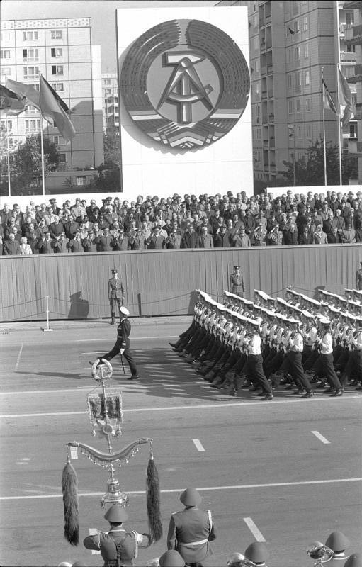 ADN-ZB/Reiche/7.10.84/ Berlin: 35.Jahrestag / Ehrenparade Vorbeimarsch der Fußtruppen an der Ehrentribüne.